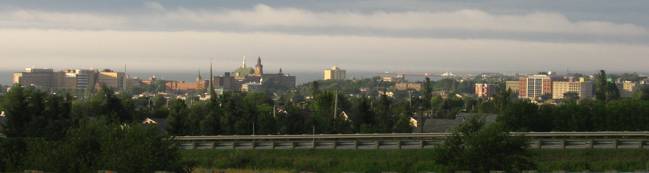 Vue panoramique de Rimouski